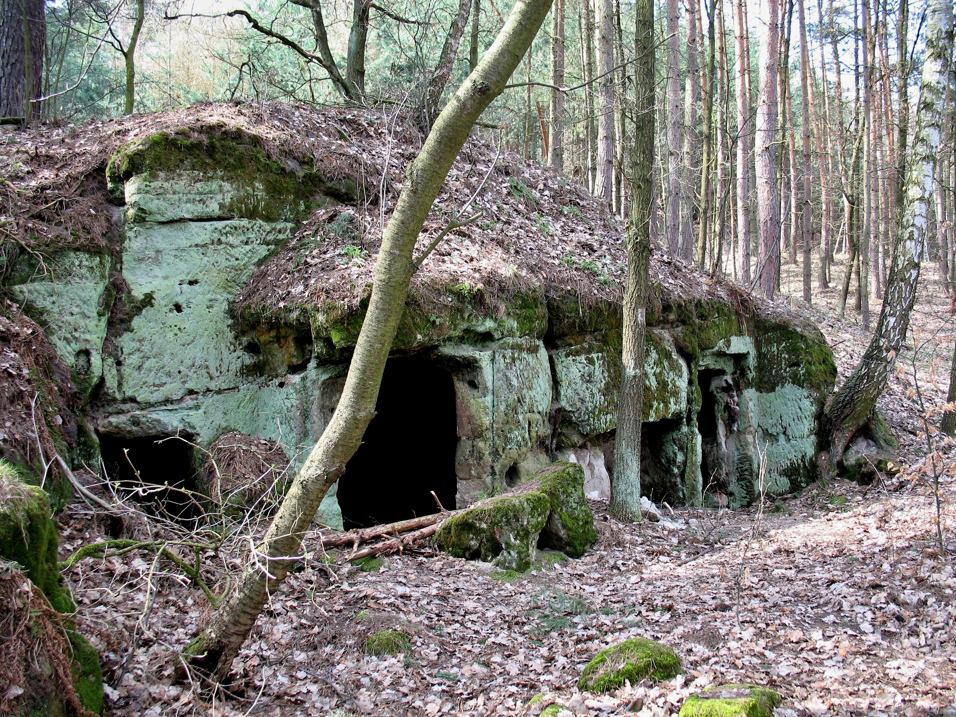 Zbytky zaniklé osady Lammel (Lammelschänke), česky U Beránka, na jihovýchodním úpatí Skalického vrchu (katastr Skalice u České Lípy). Stav v roce 2013